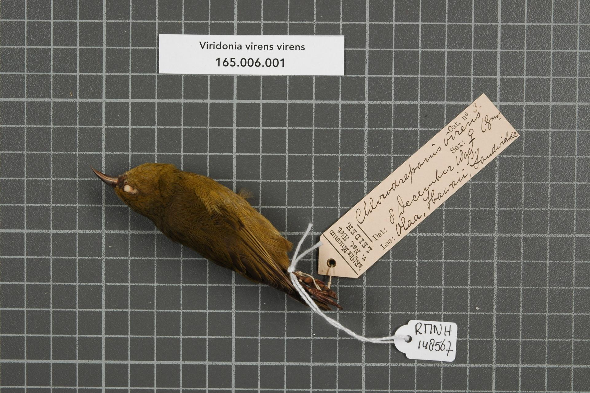 Viridonia virens virens (Gmelin, 1788)